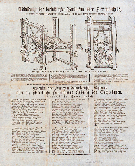 Abbildung der berüchtigten Guillotine … Die Hinrichtung Ludwigs XVI. von Frankreich und die Wirkung der Guillotine, Holzschnitt mit Versen